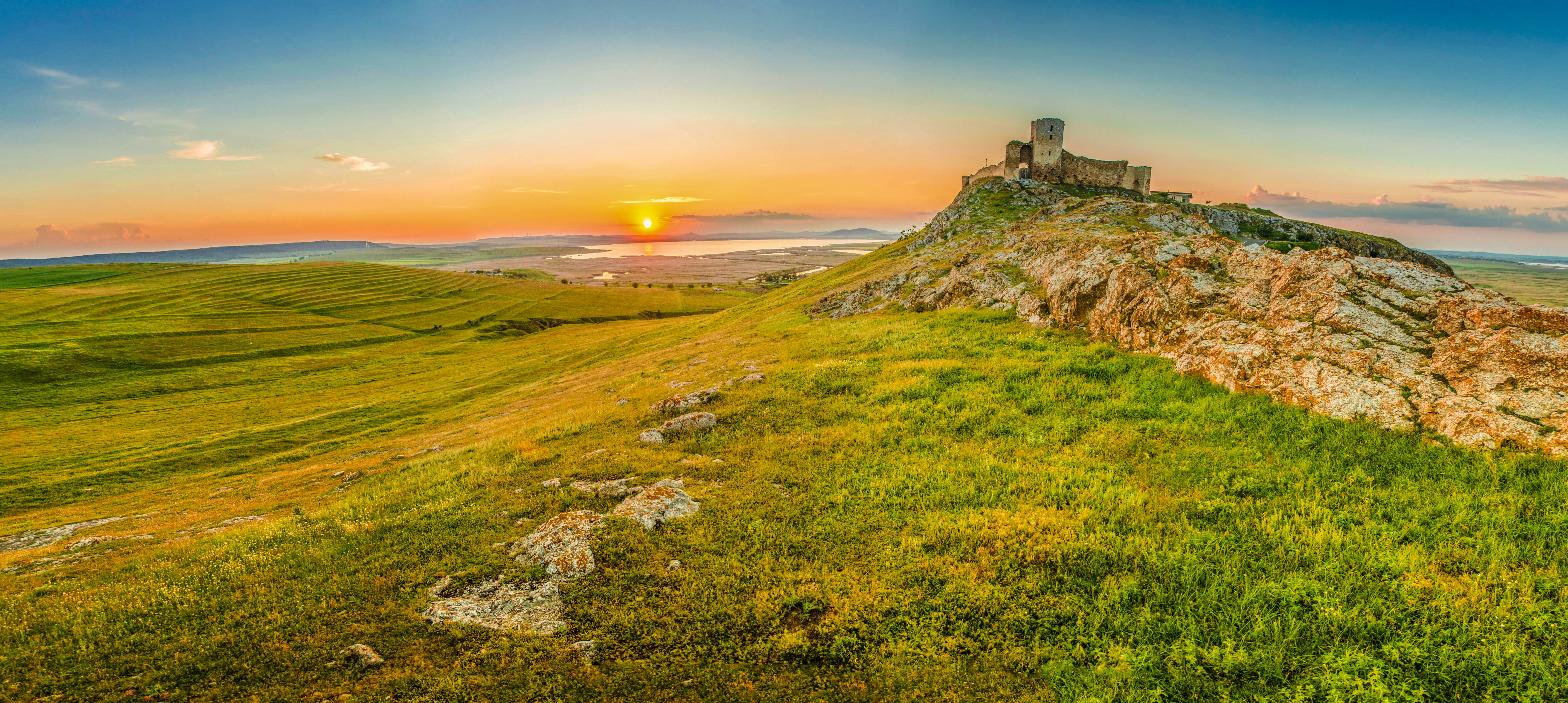 Cetatea Enisala surprinsa la apus